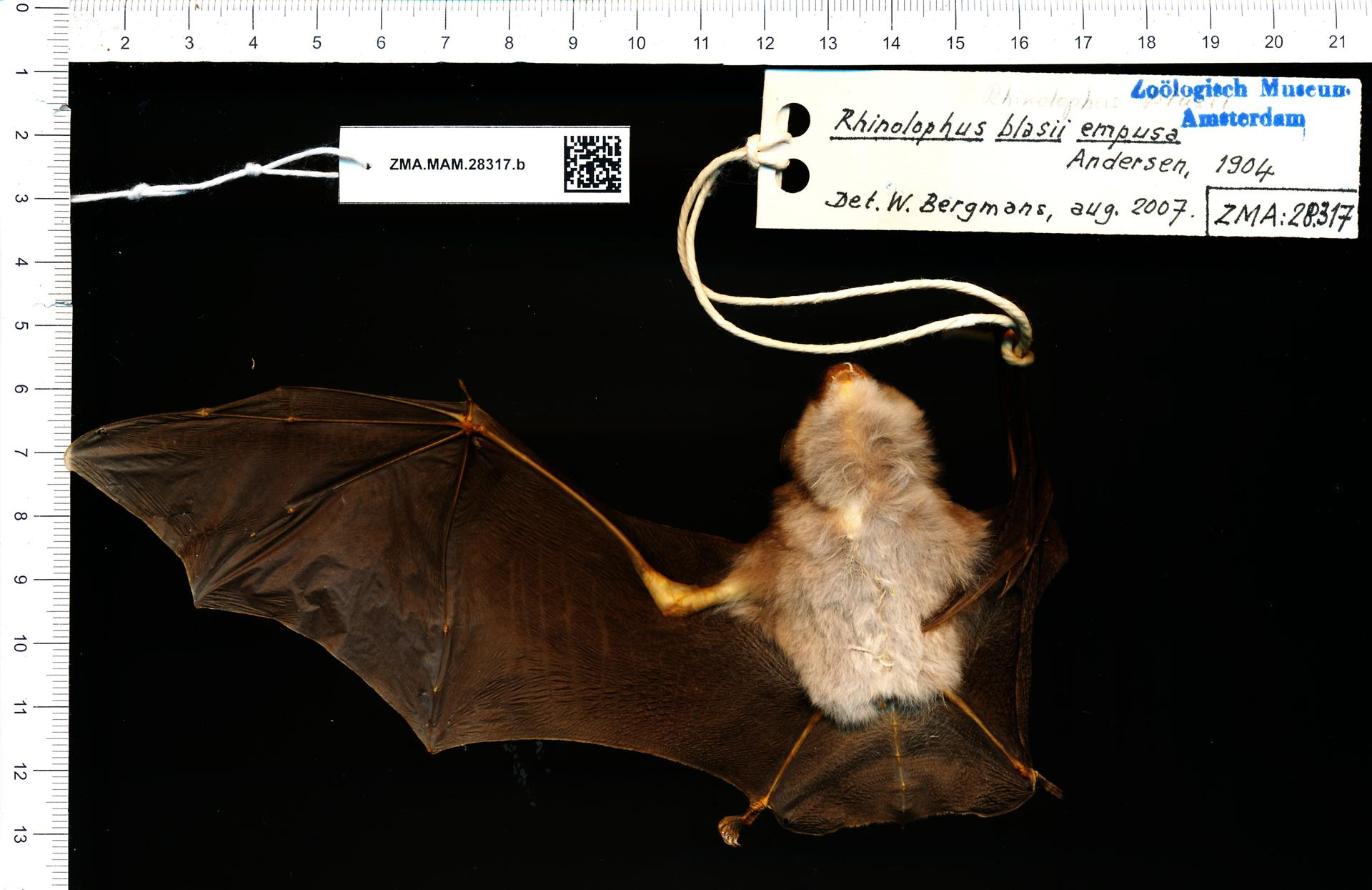 Rhinolophus blasii empusa